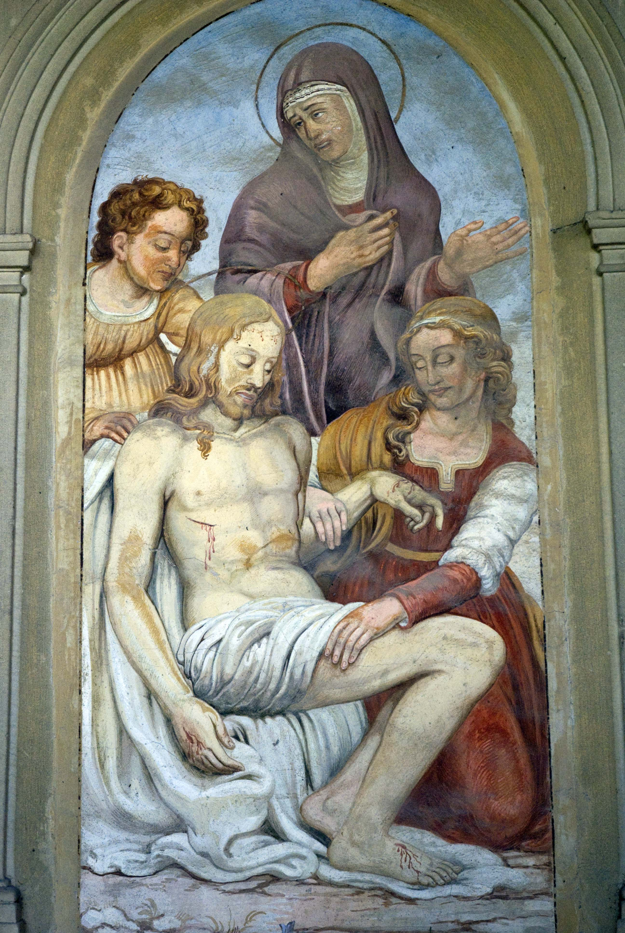 Pietà (Pannello centrale del tabernacolo strozzi) attribuita al Bronzino